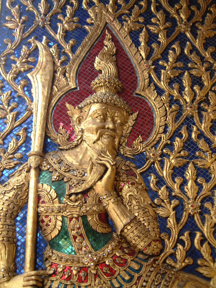 Wat Ratchabopit (วัดราชบพิธสถิตมหาสีมารามราชวรวิหาร), Bangkok, Thailand